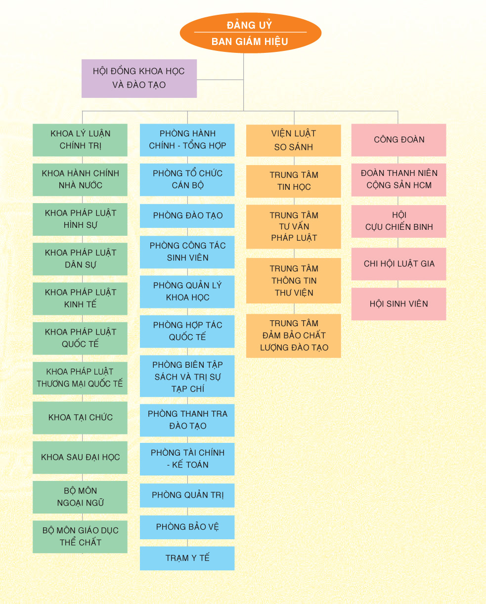 Sơ đồ tổ chức Trường Đại học Luật Hà Nội